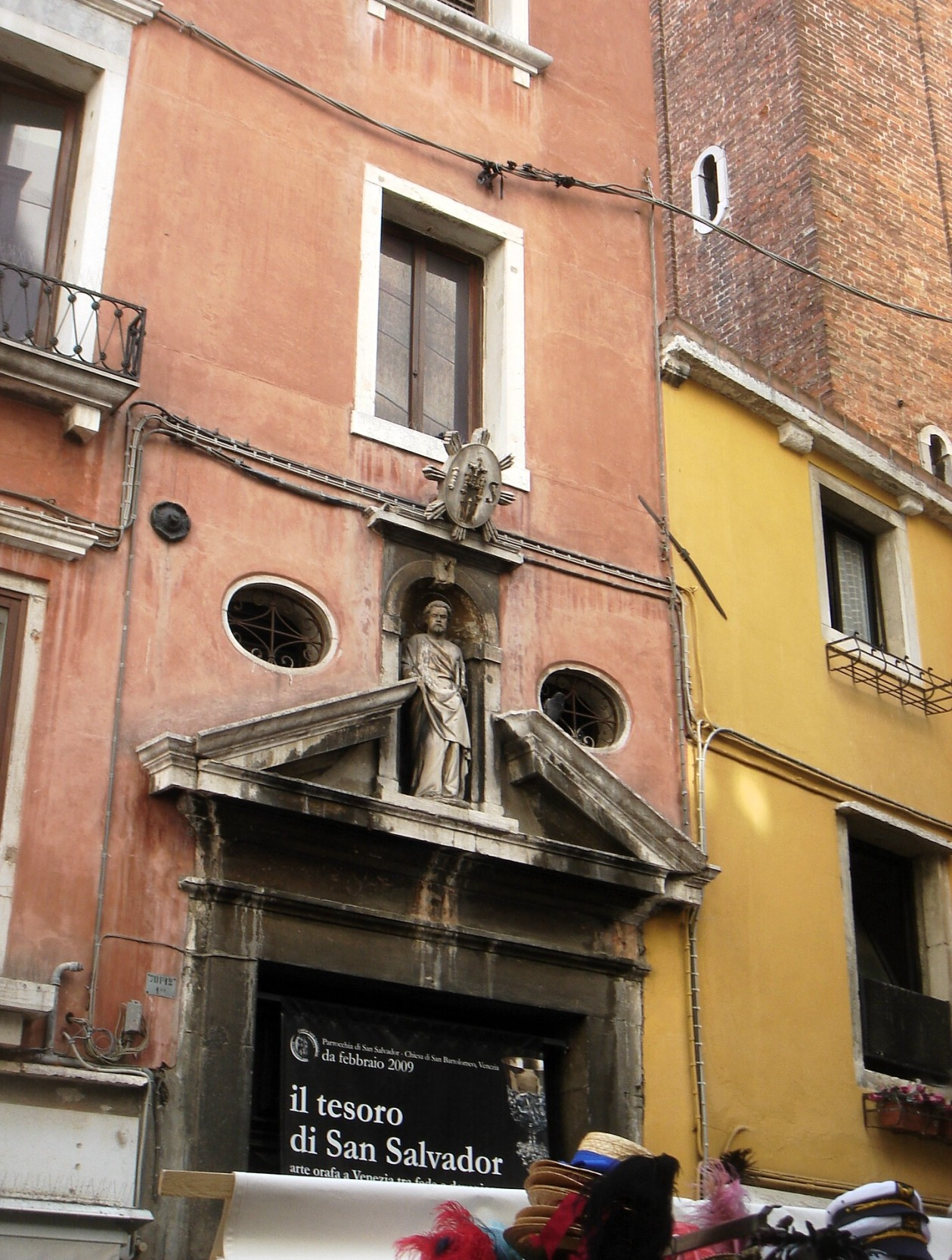 Venezia: portale laterale dell'ex Chiesa di San Bartolomeo, presso il Ponte di Rialto.